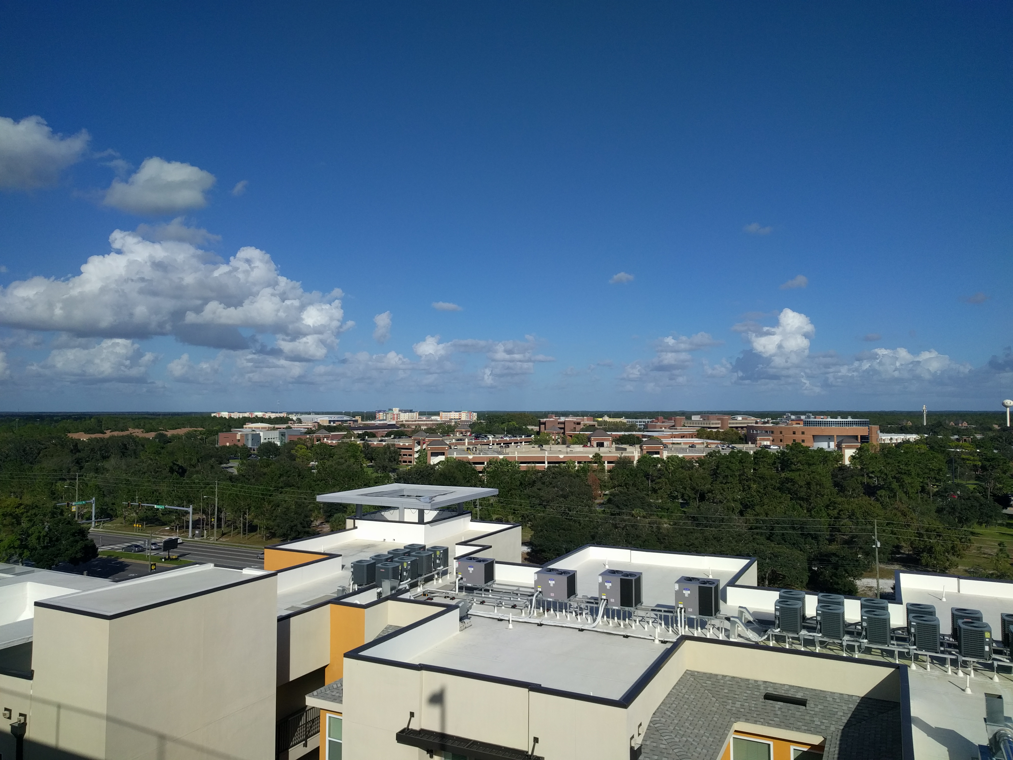 UCF Main Campus